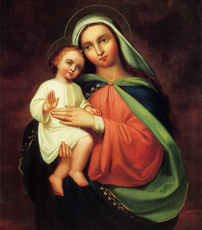 Madonna mit Jesuskind von Frank Duveneck (1848-1919)